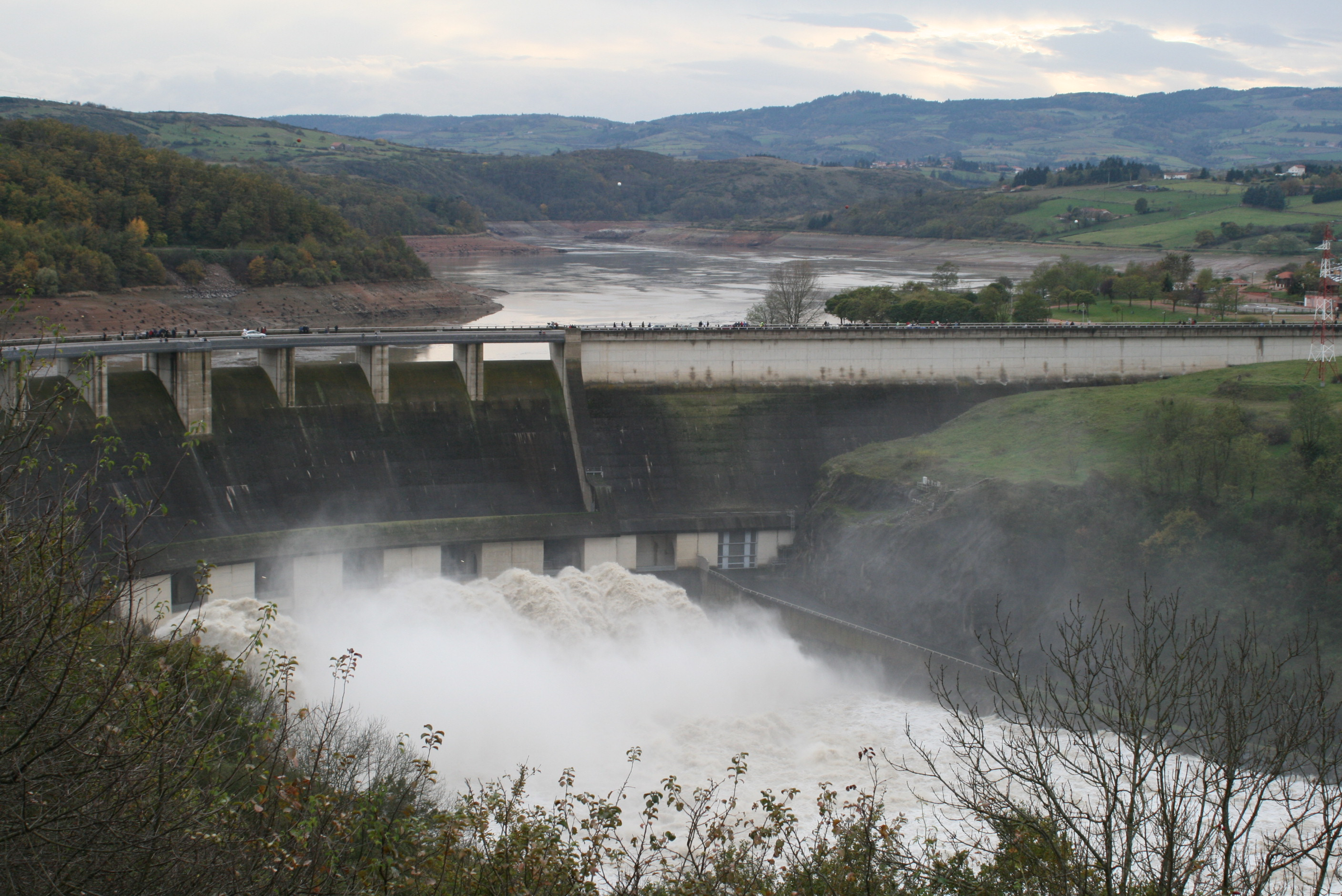 Vidange du lac de retenue du barrage de Villerest lors de la crue de la Loire le 2 novembre 2008